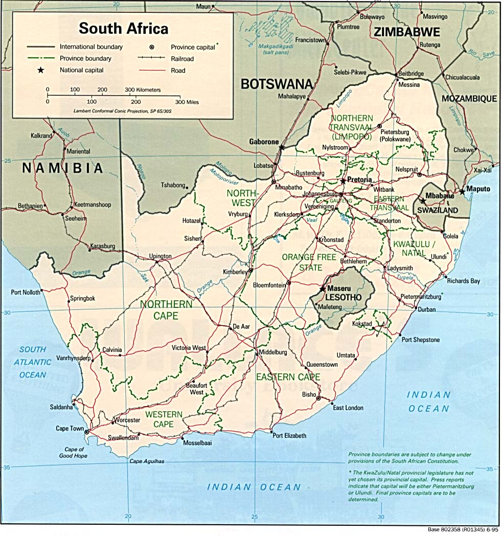 Südafrika